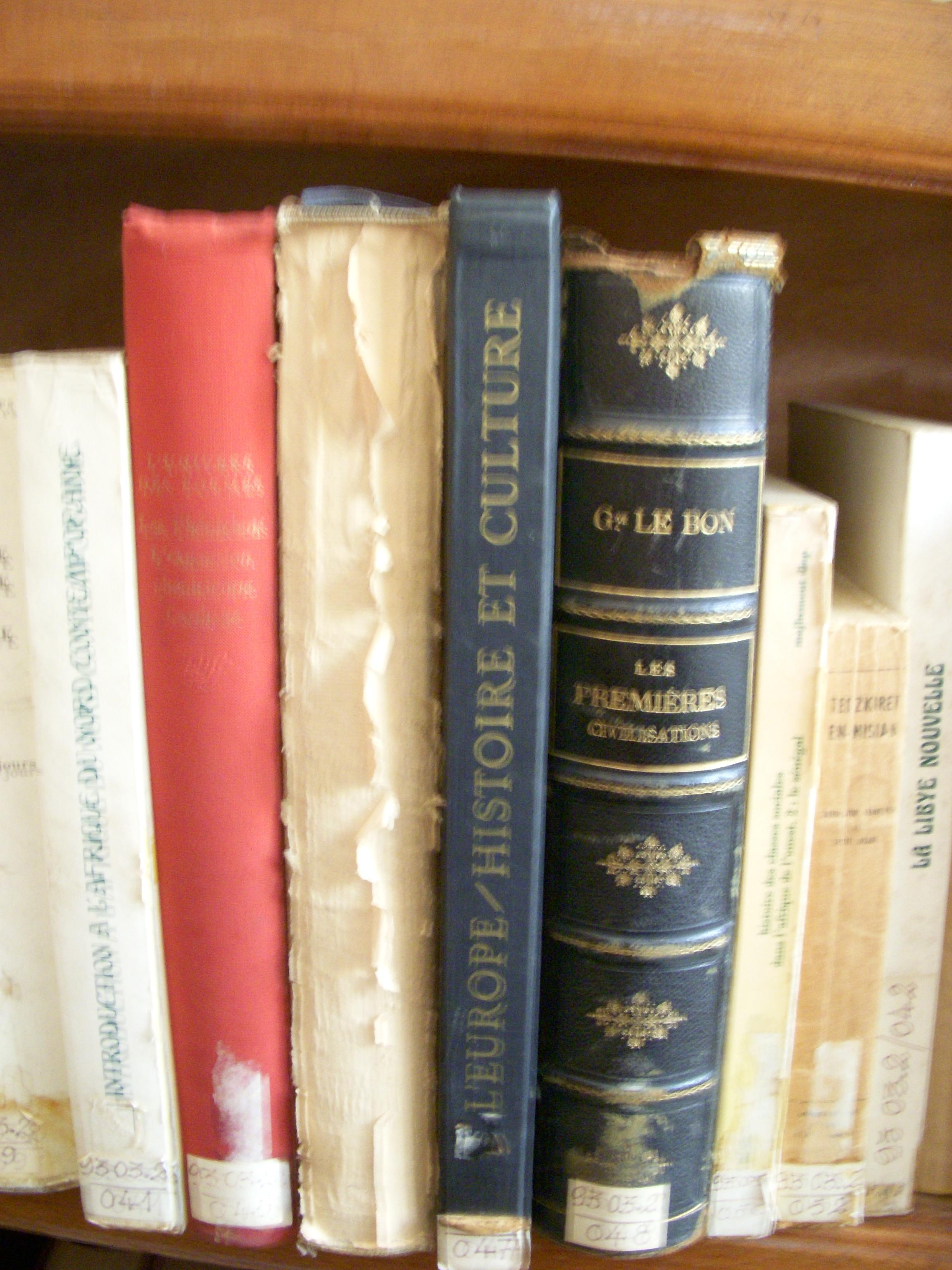 Les premières civilisations, un ouvrage de Gustave Le Bon, sur les rayonnages de l'Institut islamique de Dakar, Sénégal